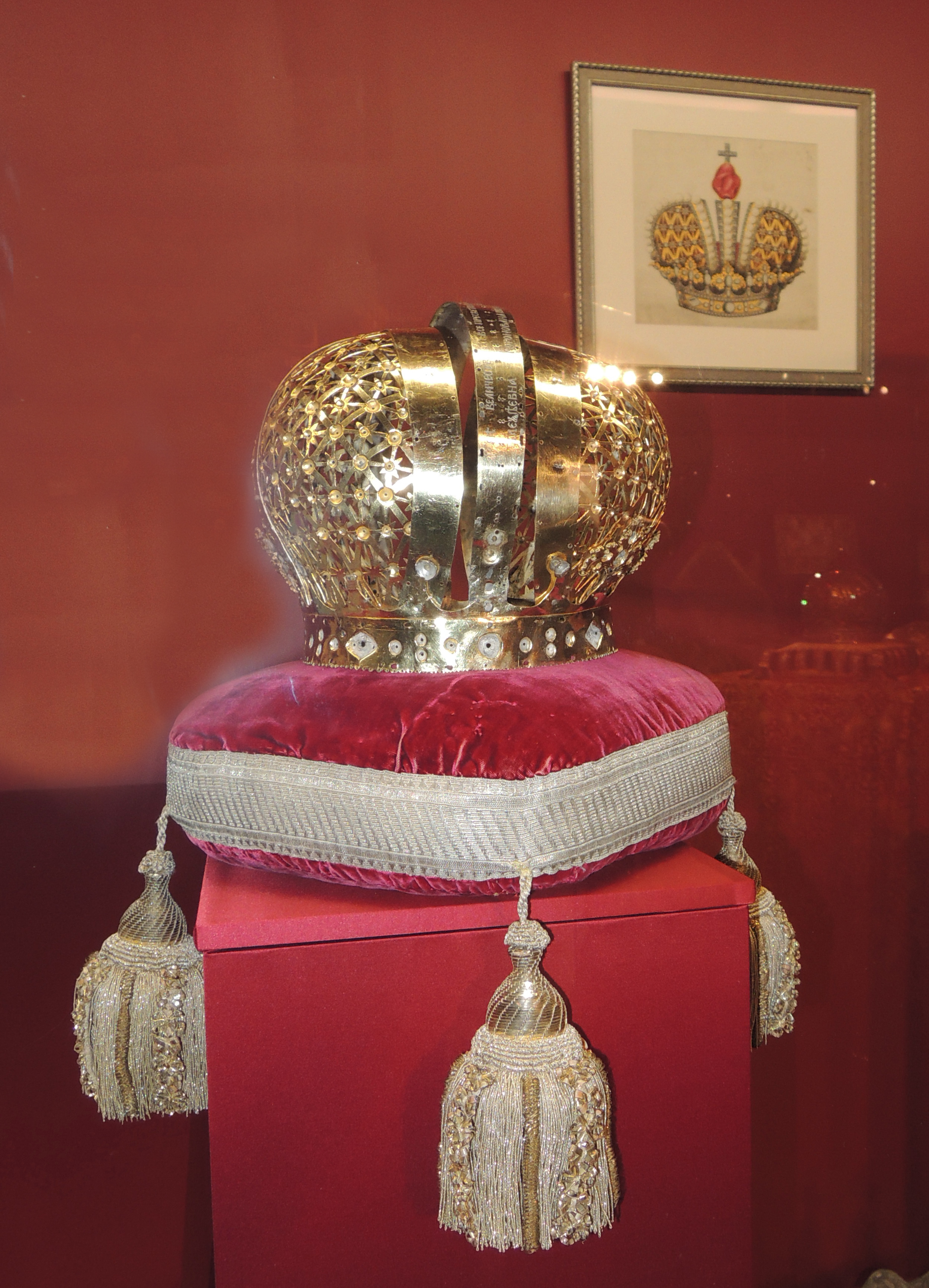 Корона Екатерины I